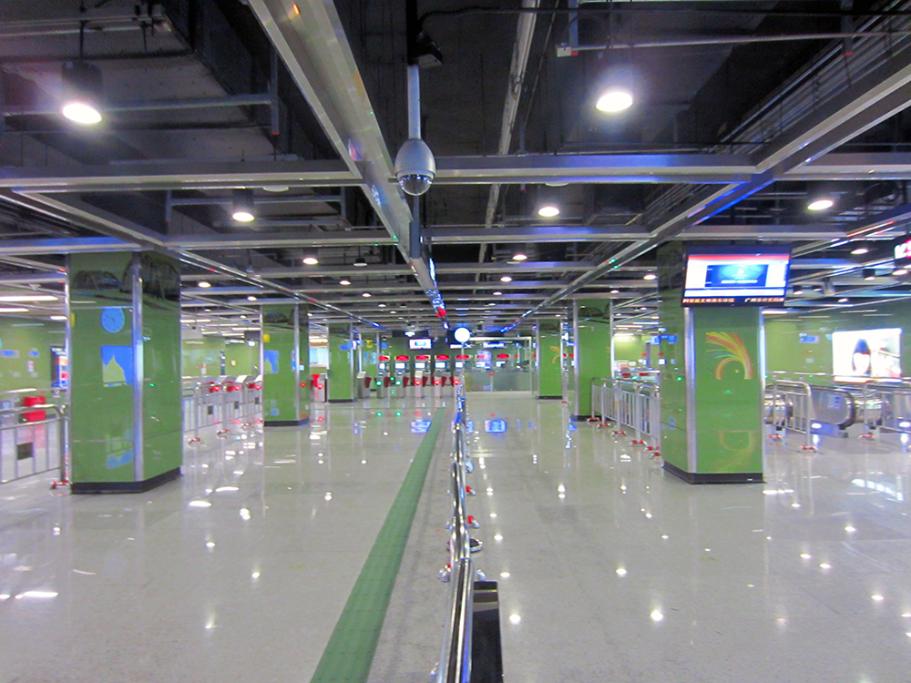 海珠廣場站6號線站廳